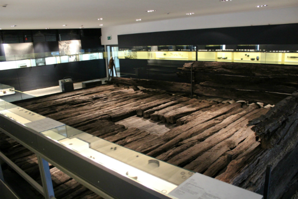 Franziskanermuseum Villingen, Keltische Grabkammer Magdalenenberg